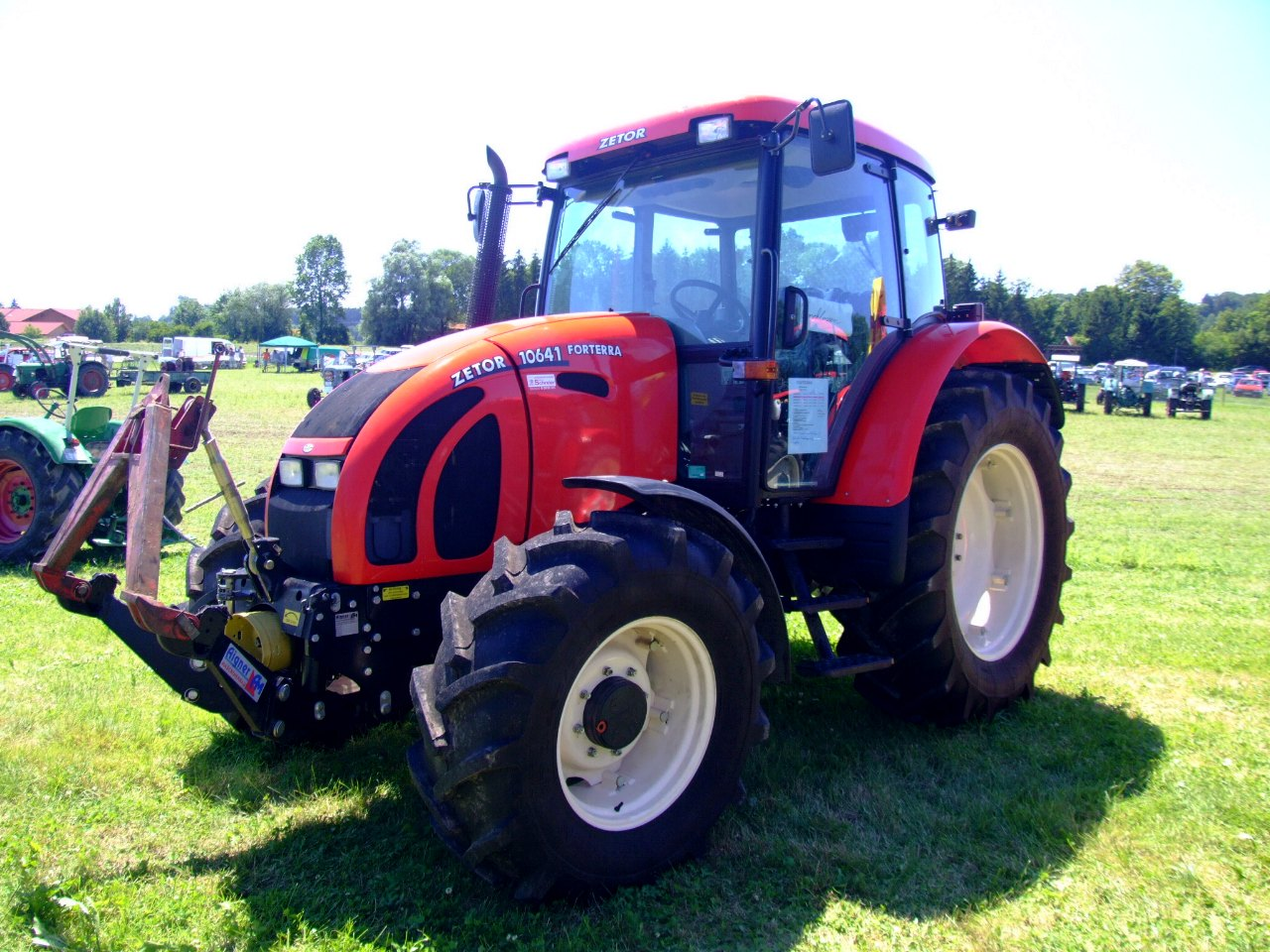 Zetor-Traktor 10641 Forterra mit Weiste-Dreieck am Fronthubwerk